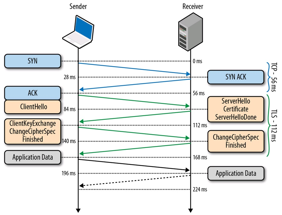 shtrengimi i duarve tek tls-i